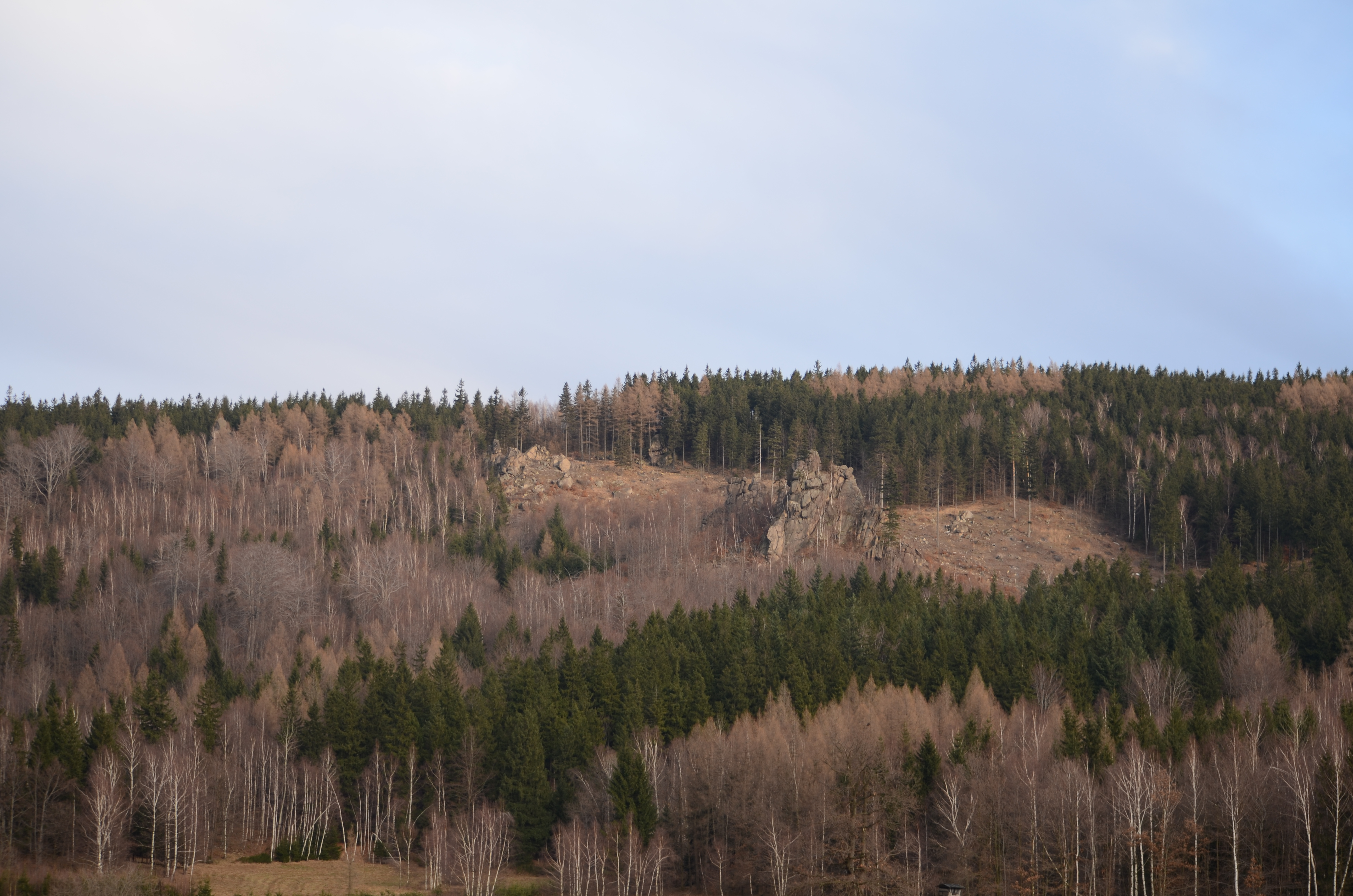 widok z Strużnicy